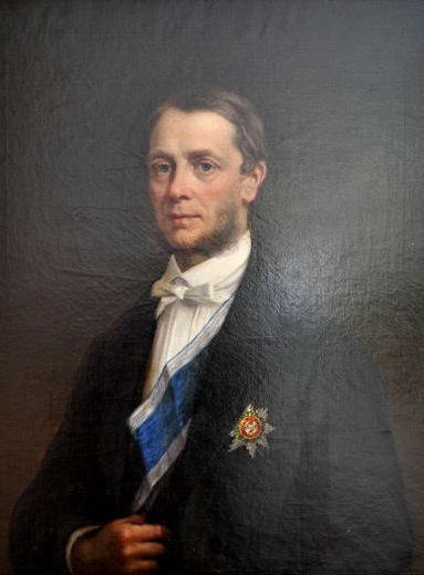 Edmund Hartig (1812 - 1883), Rakouský a český diplomat a politik.